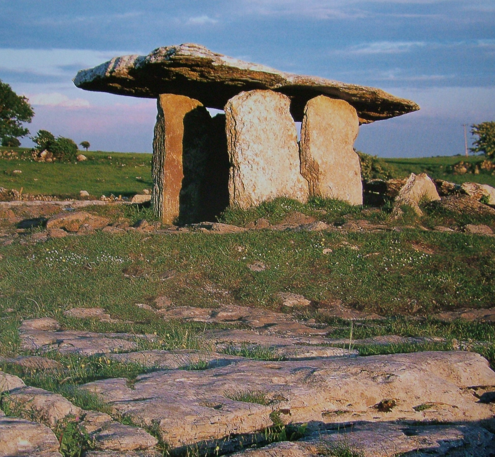 Poulnabrone, Írország: dolmen (Co Burre Clare)